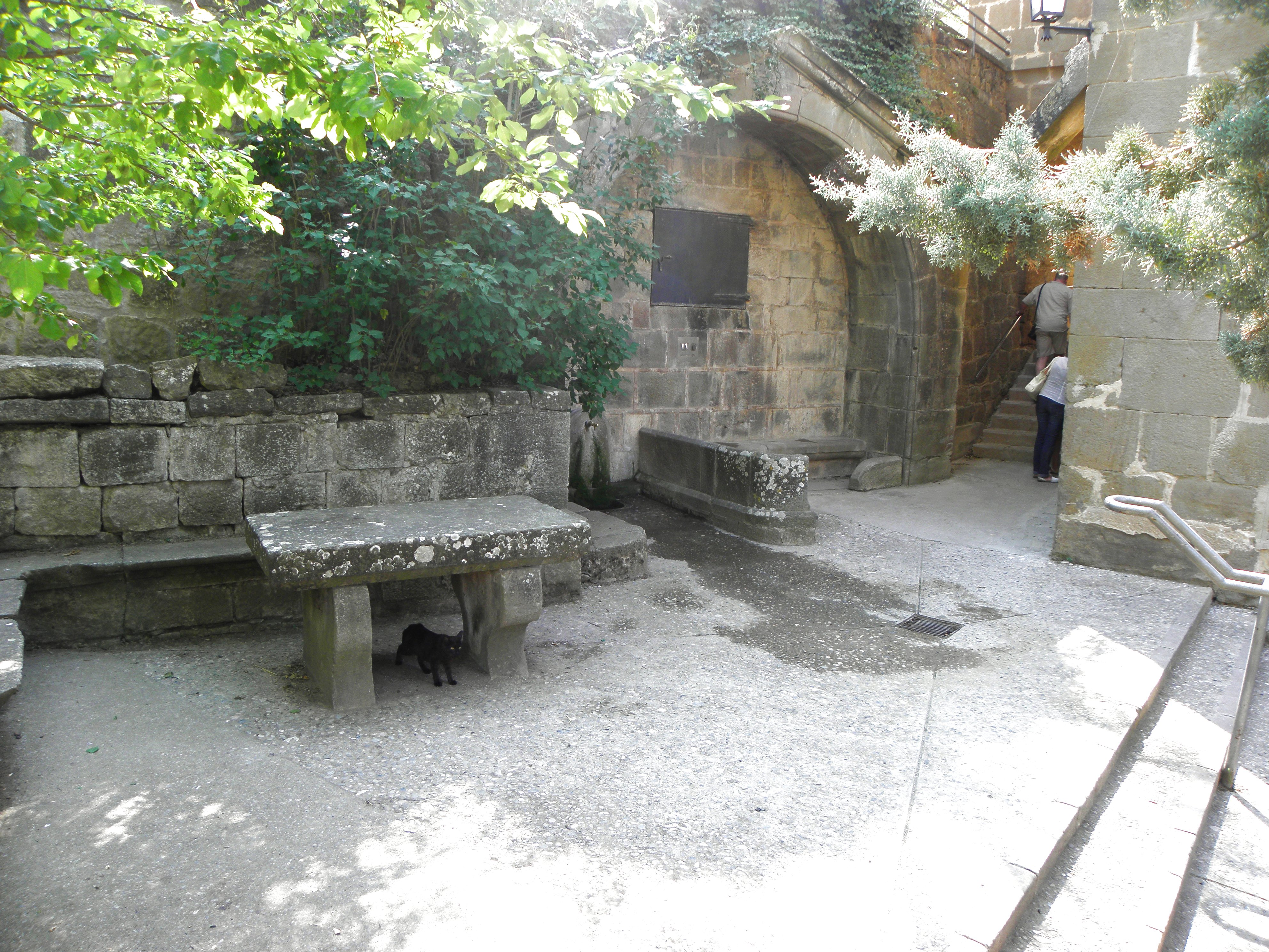 El Miracle (Riner, Solsonès). La Font de la Mare de Déu